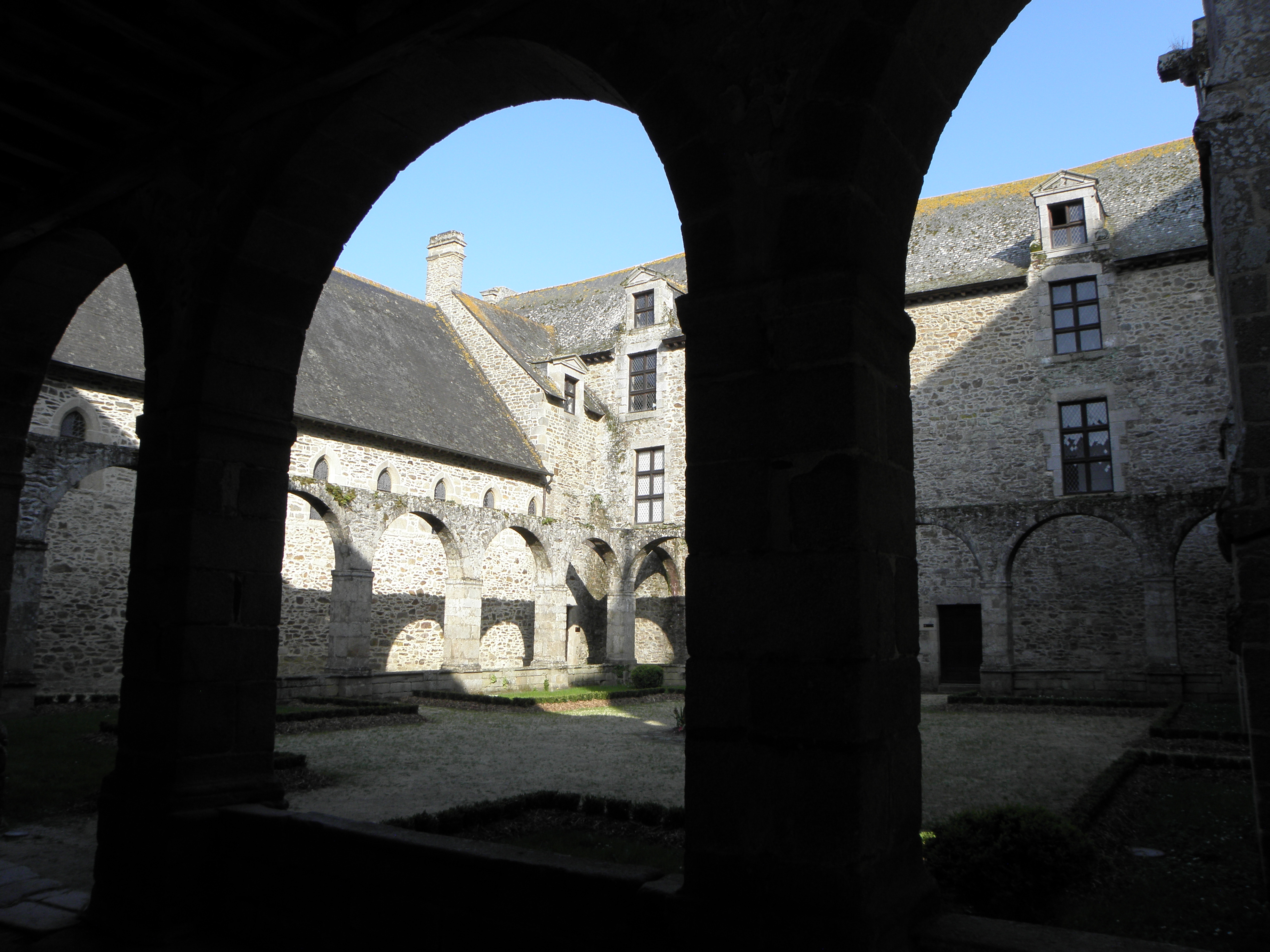 Cloître de l'abbaye de Léhon (22).